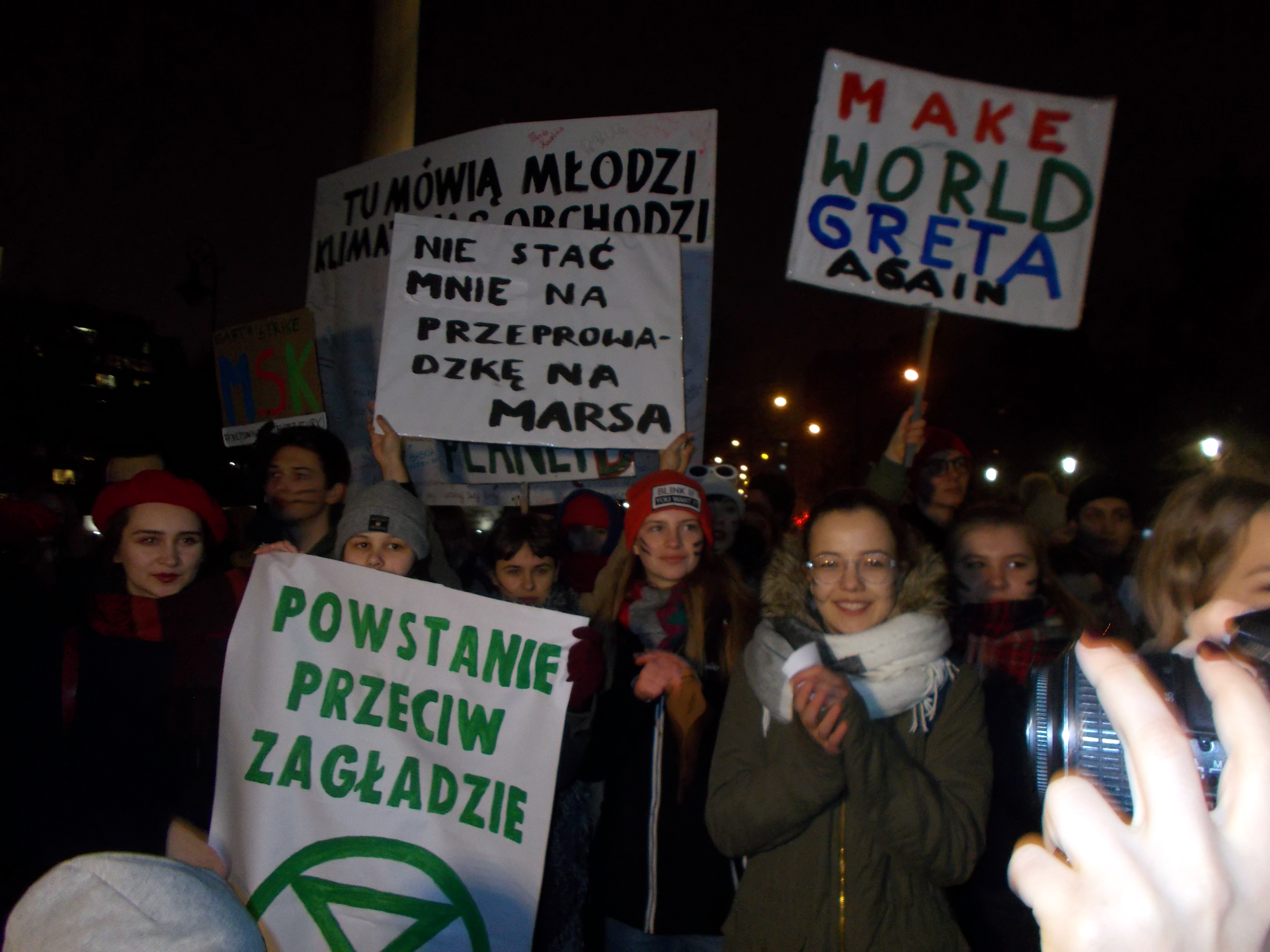 Strajk dla Ziemi 2019 Warszawa • Powstanie przeciw zagładzie • Nie stać mnie na przeprowadzkę na Marsa • Make world Greta again • Tu mówią młodzi – klimat nas obchodzi